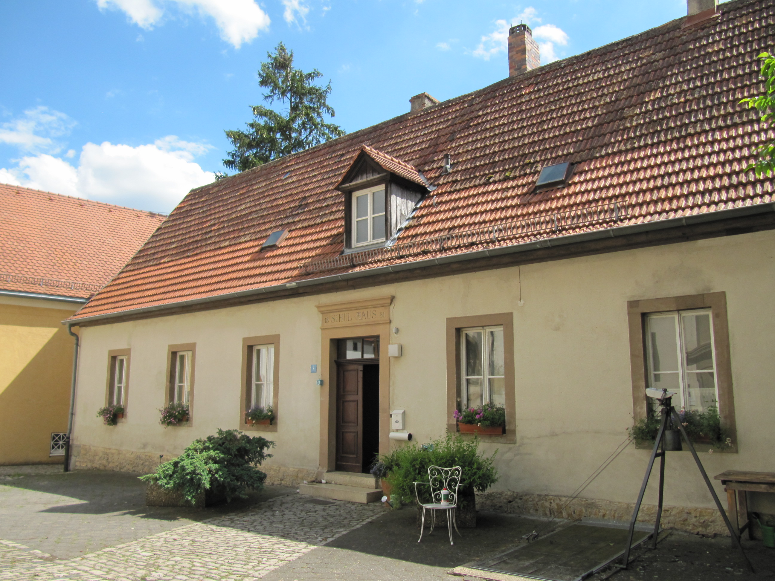 Alte Schule von Markt Einersheim